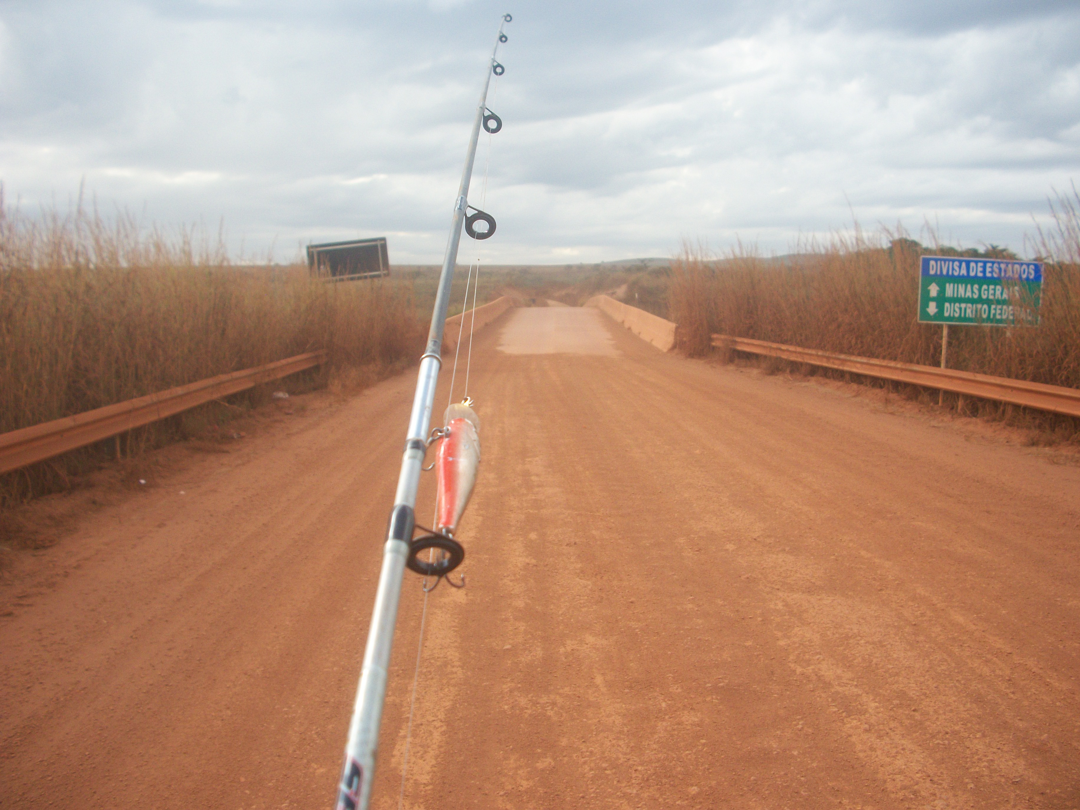 Divisa entre Distrito Federal e Minas Gerais (Brasil).